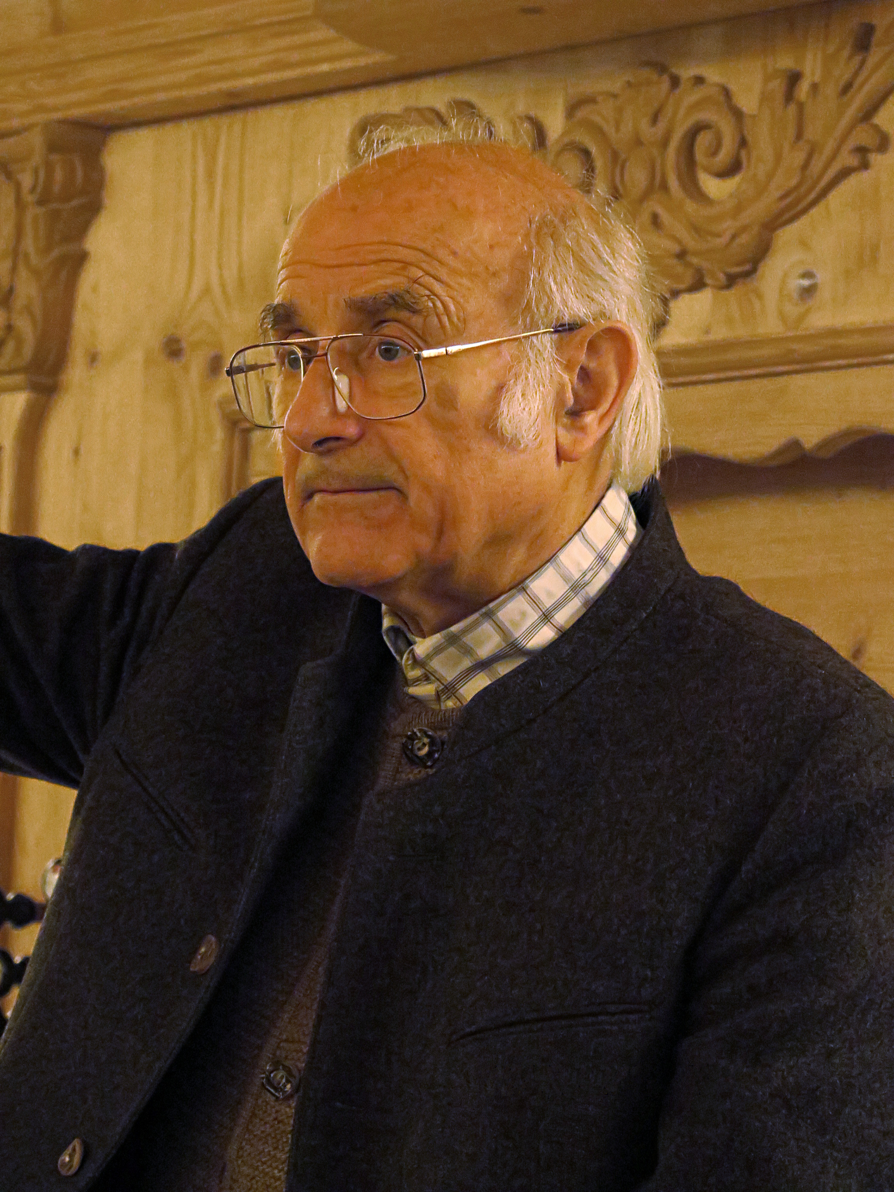 Sixtus Lampl im Orgelzentrum Valley